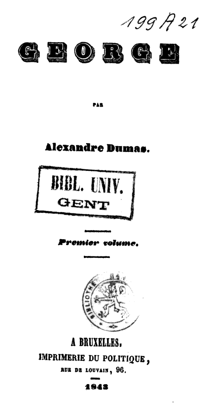 Page de titre de l'édition de George de Alexandre Dumas (père), imprimerie du politique, 1843. A noter que le titre imprimé est "George", sans "s".